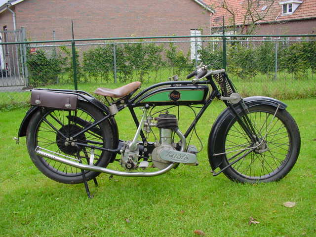 Rush 1924 sidevalve.